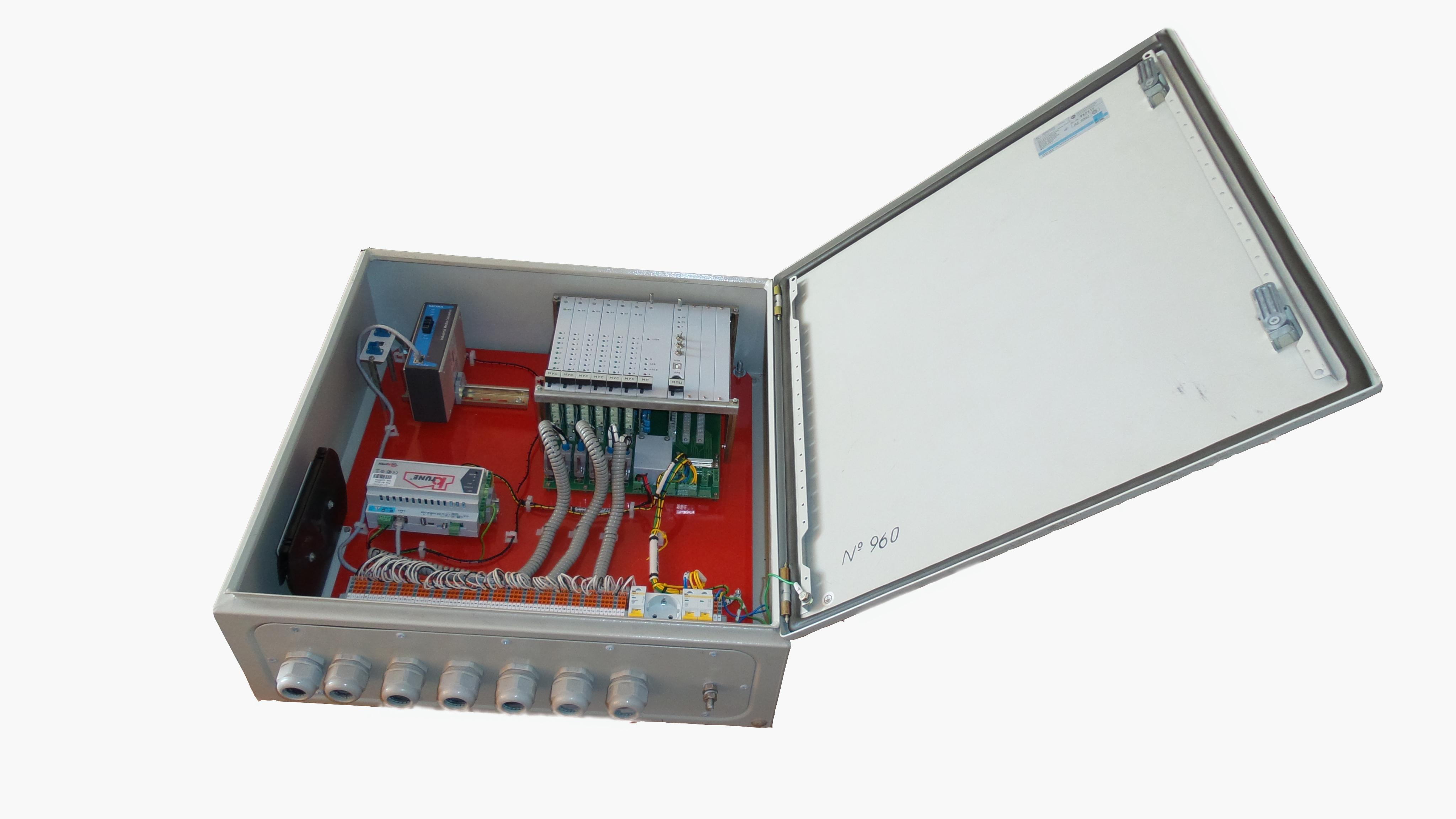 Современный дорожный контроллер, модель "ДК 2"